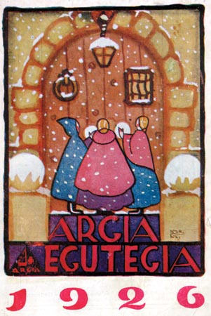 Ignacia Zabaloren (Nor_Nai) ilustrazioa, Argiaren egutegiko azala, 1926.